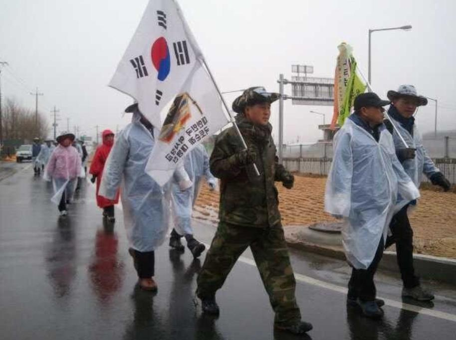 학사장교 창설 30주년 기념 국토순례 대행진